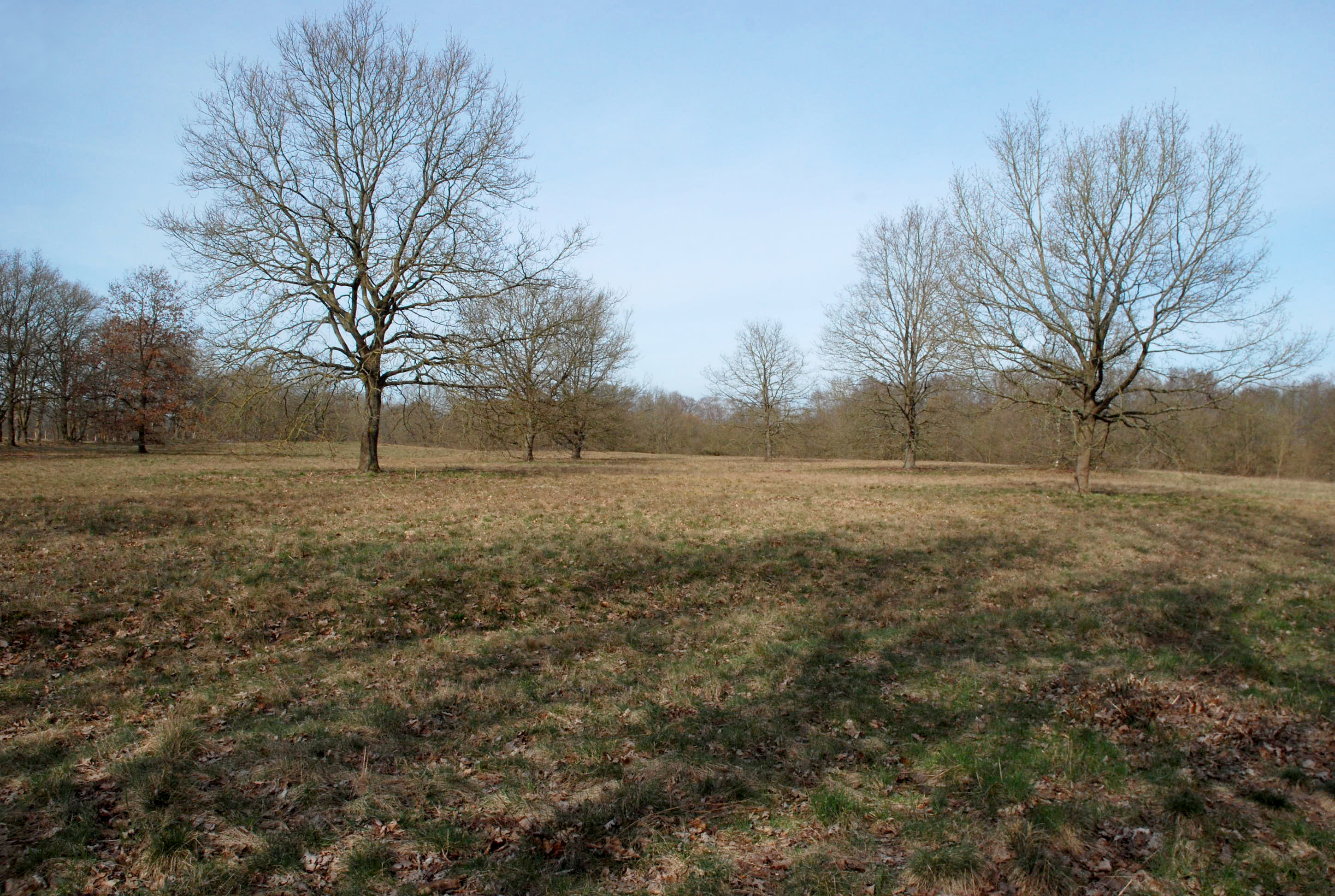 Herrnburger Dünen in Lübeck, Gleisweg